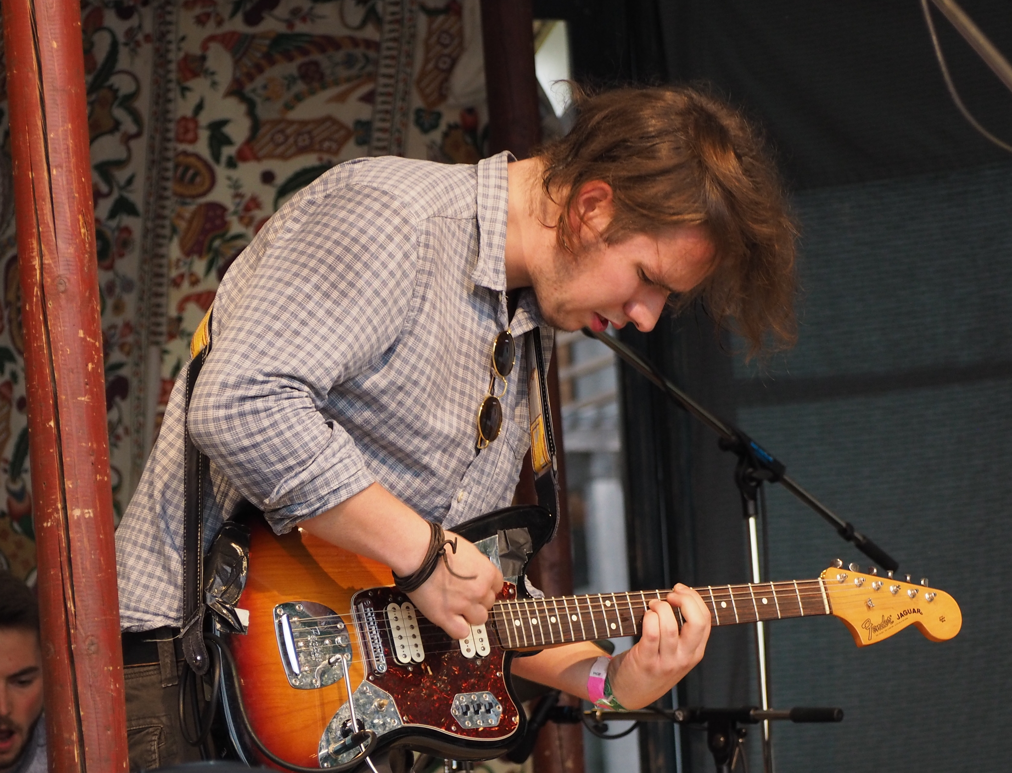 Sammersee Festival 2015 - Kandinsky. Ben Meyer mit einer Fender Jaguar Festivalsommer This photo was created with the support of donations to Wikimedia Deutschland in the context of the CPB project "Festival Summer". This file is made available under the Creative Commons CC0 1.0 Universal Public Domain Dedication. The person who associated a work with this deed has dedicated the work to the public domain by waiving all of their rights to the work worldwide under copyright law, including all related and neighboring rights, to the extent allowed by law. You can copy, modify, distribute and perform the work, even for commercial purposes, all without asking permission. Thomas Springer Personality rights warningAlthough this work is freely licensed or in the public domain, the person(s) shown may have rights that legally restrict certain re-uses unless those depicted consent to such uses. In these cases, a model release or other evidence of consent could protect you from infringement claims.